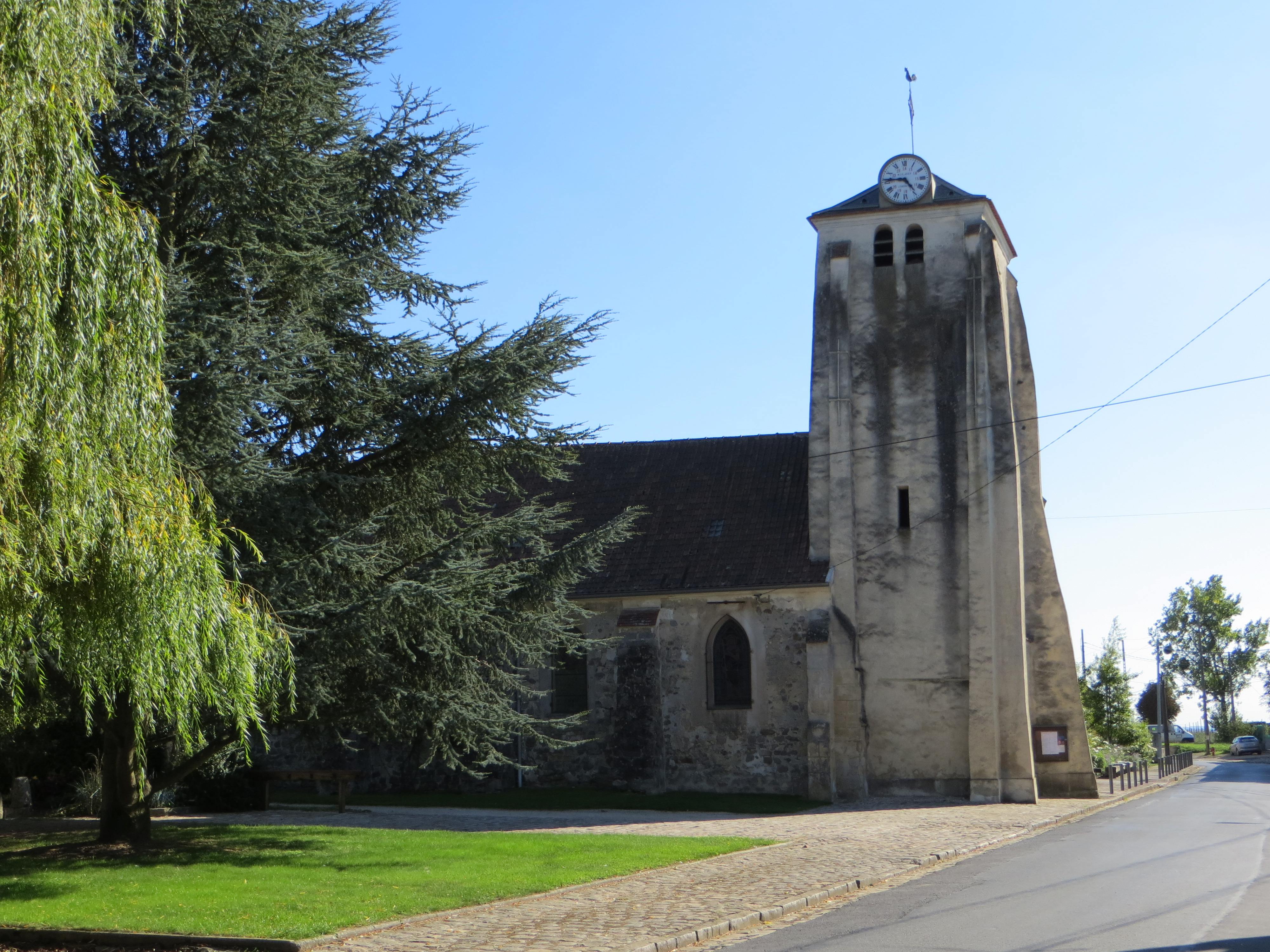 Vue générale de l'église